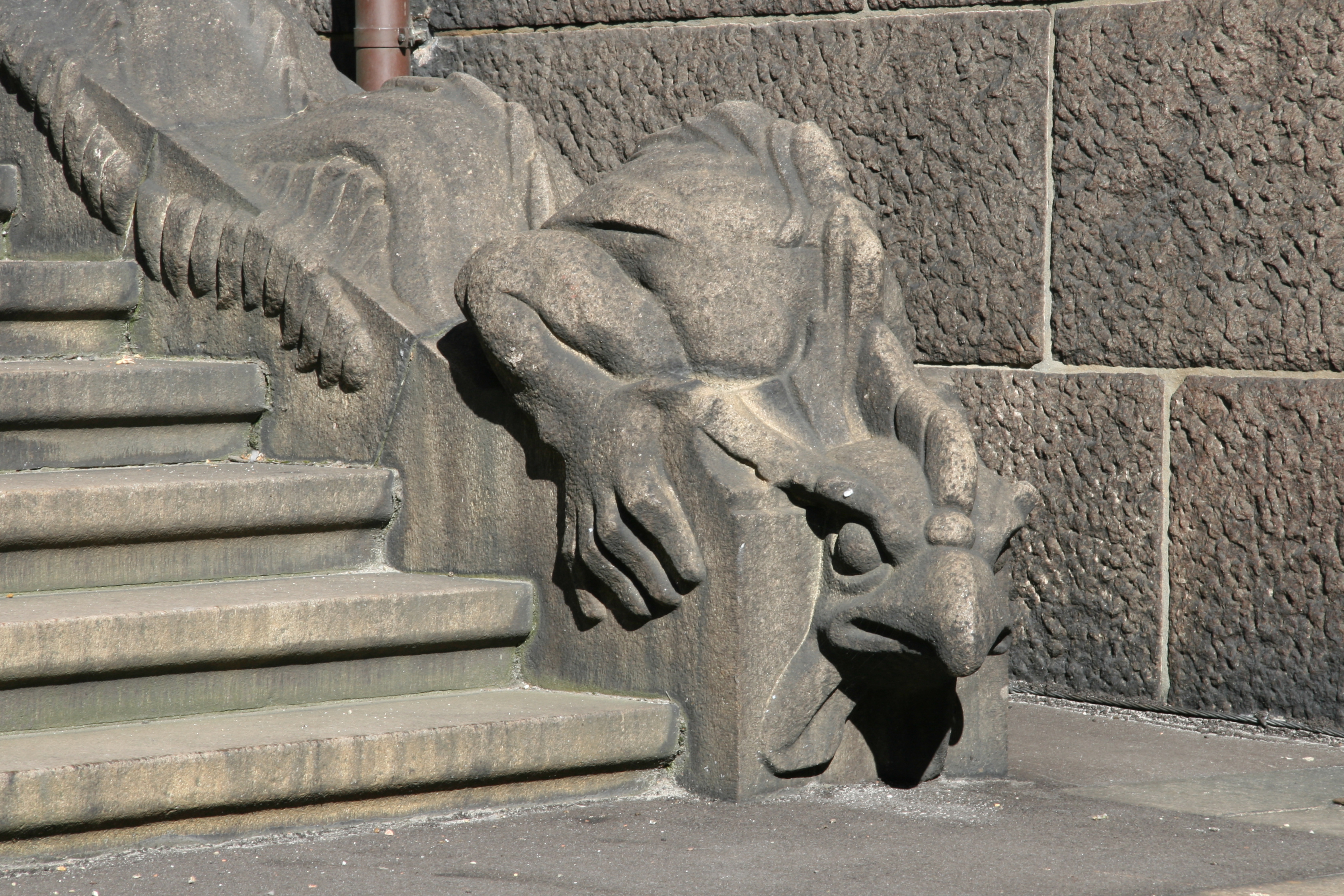 Københavns Rådhus, Rådhushaven. Town Hall of Copenhagen, The garden. Staircase. Trappedetalje.